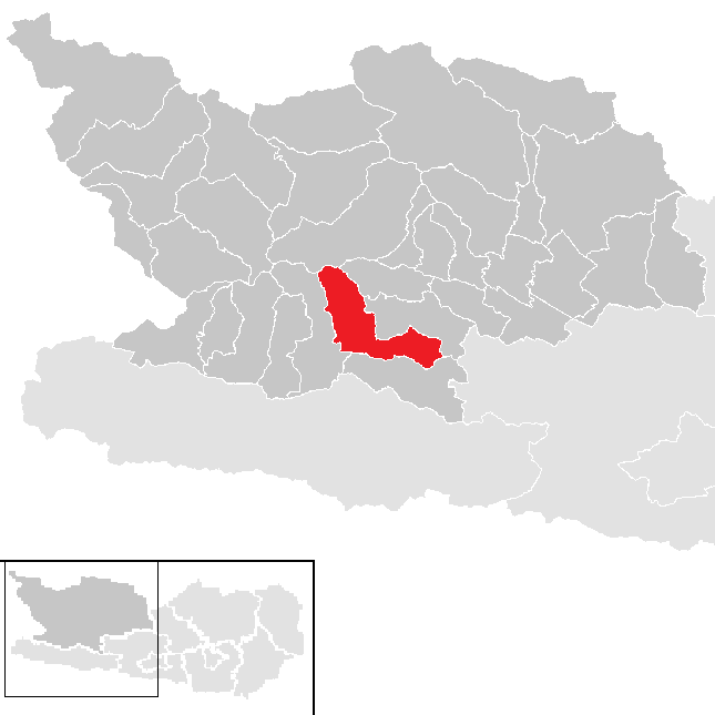 Bezirk Spittal an der Drau